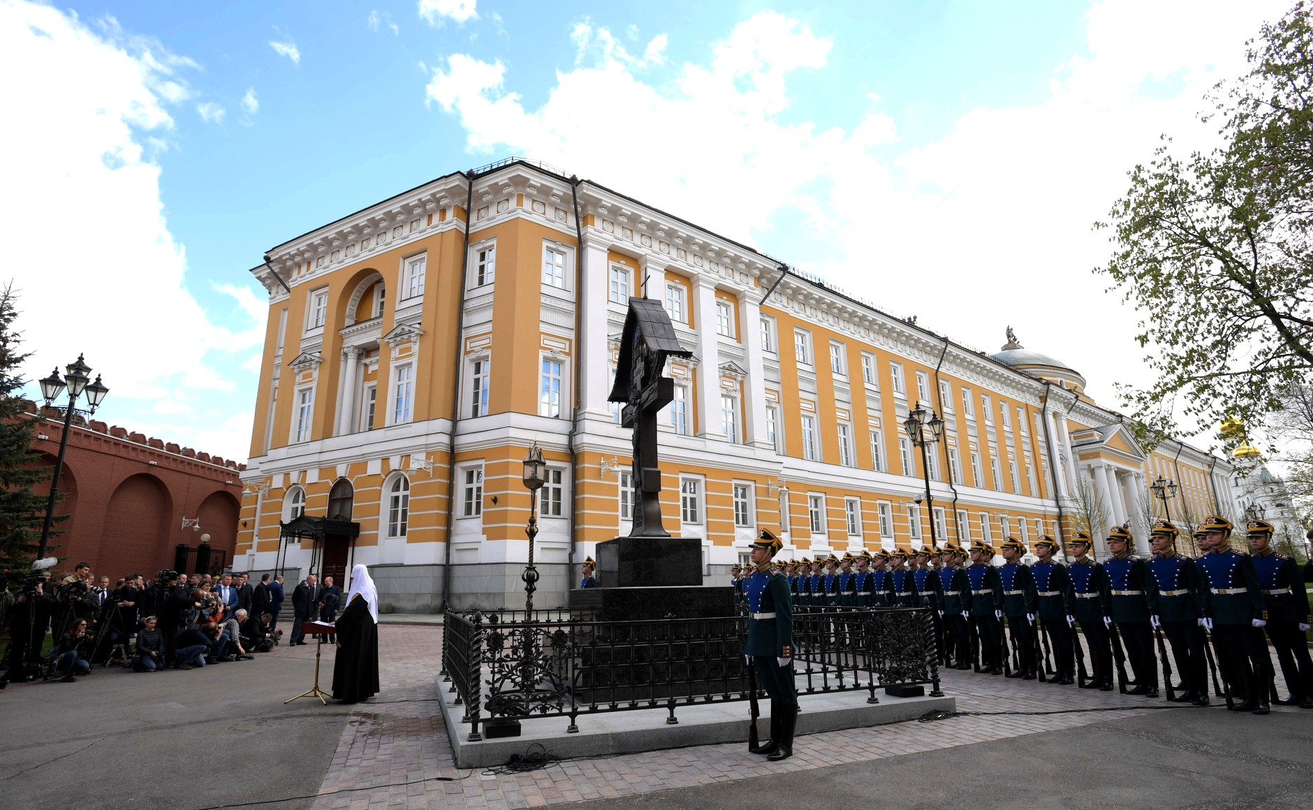 Открытие памятника великому князю Сергею Александровичу с участием Президента России Владимира Путина и Патриарха Московского и всея Руси Кирилла в сквере у Никольской башни Московского Кремля